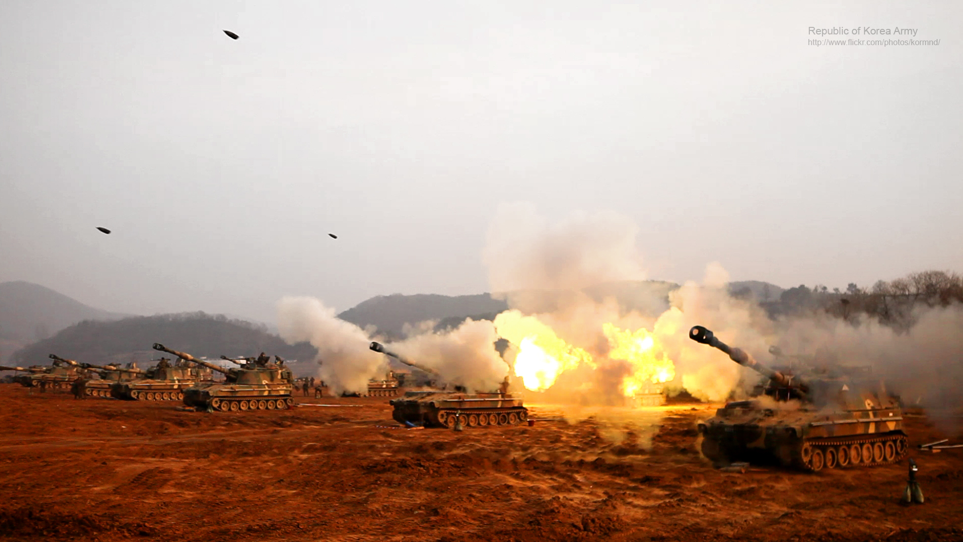 육군 9사단 백두산대대 K-55자주포들이 최근 경기 파주시 스토리 훈련장에서 열린 실사격 훈련에서 적진을 향해 일제히 포문을 열고 있다. 부대는 실전적인 전장상황을 가정한 신속·정확한 포탄 사격을 통해 적의 도발의지를 꺾을 수 있는 사격 능력을 재확인했다. - 3월 14일 촬영한 사진을 자료로 사용하였습니다. 사진제공 - 서백일 중위